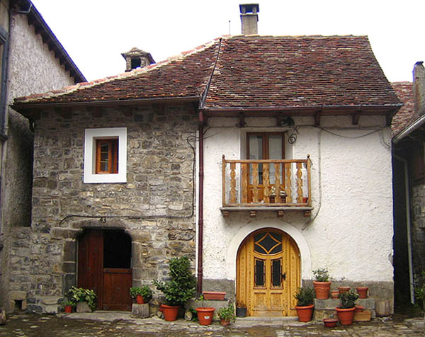 Cases d'estil basc i aragonès del poble d'Ansó, al pirineu aragonès.